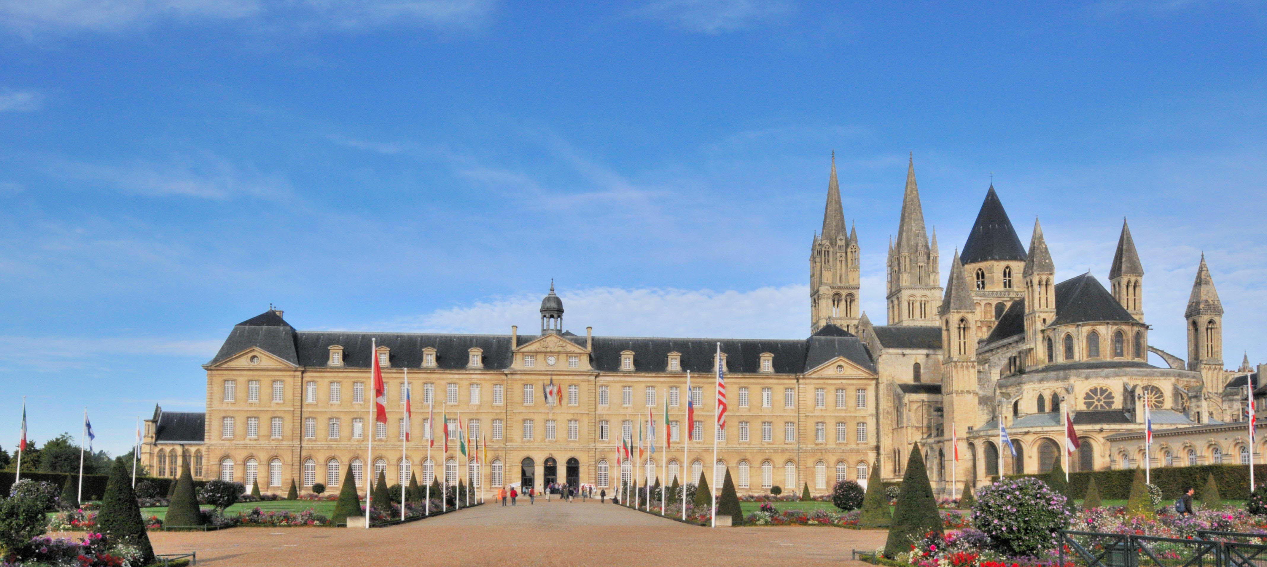 ancienne abbaye aux Hommes, actuellement hôtel de ville de Caen (Calvados, Basse-Normandie.)